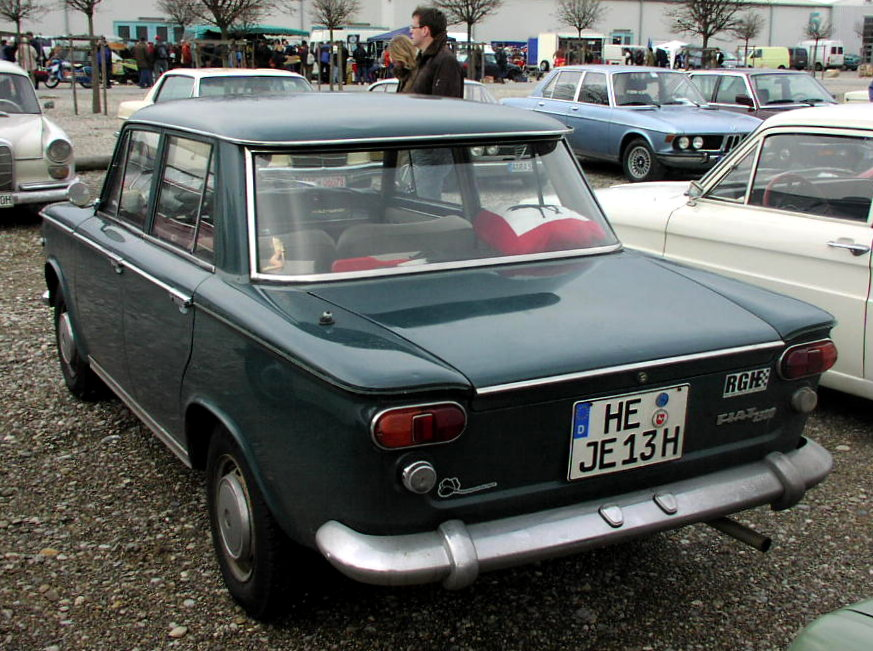 Fiat 1300 Sedan